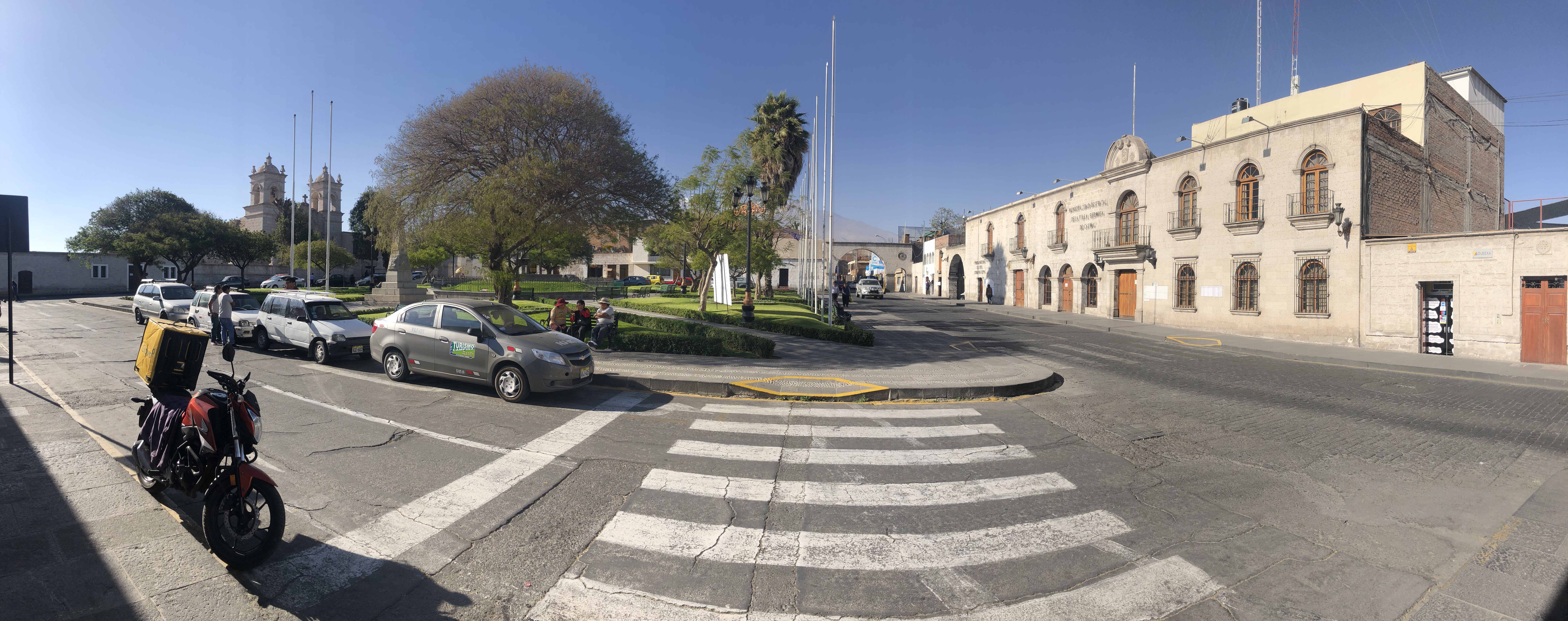 Plaza mayor de Cayma (plaza de armas)